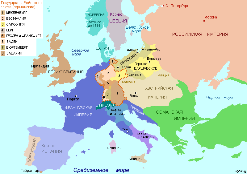 Europe map in 1812—1814 based on borders from historical maps. Границы государств нанесены в соответствии с более подробными историческими картами, отражающими ситуацию в Европе 1812 года.